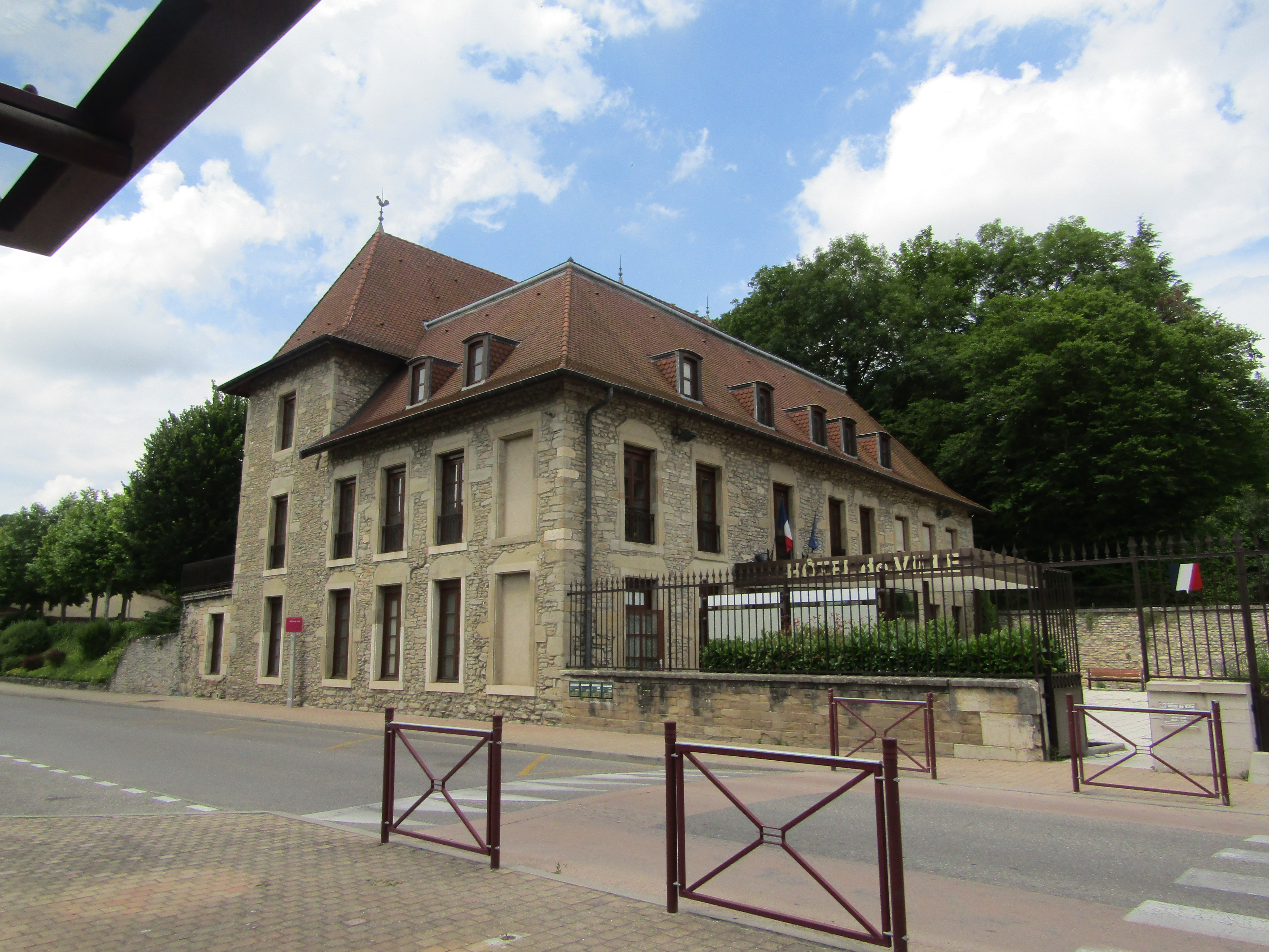 Mairie de Ruy-Montceau